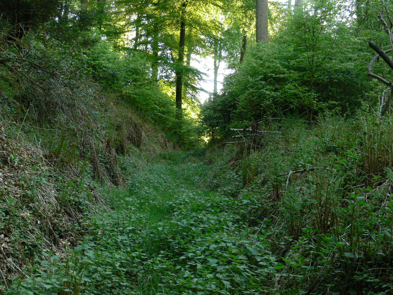 Teil des Hohlweges am Hengstberg, Naturschutzgebiet „Hengstberg“ (NSG HSK-369) bei Oberlandenbeck, Eslohe